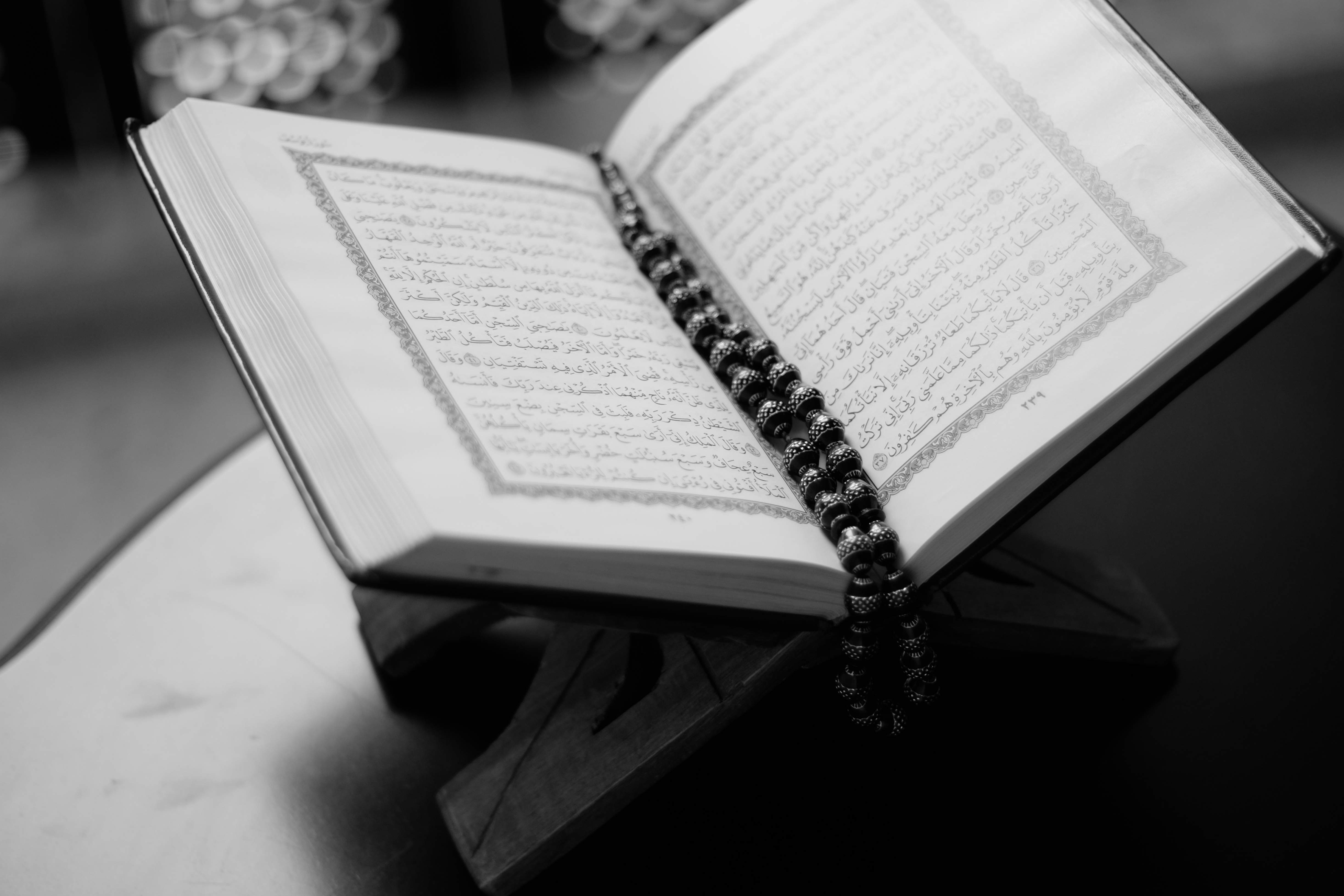 Svätý Korán